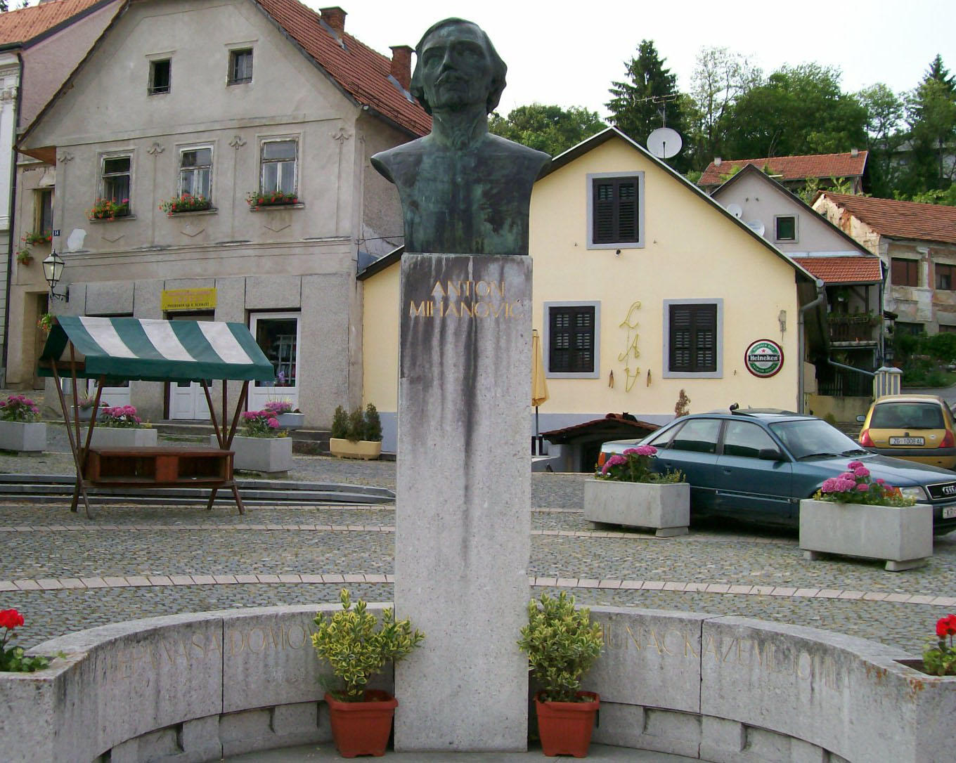 Spomenik Antunu Mihanoviću u Klanjcu